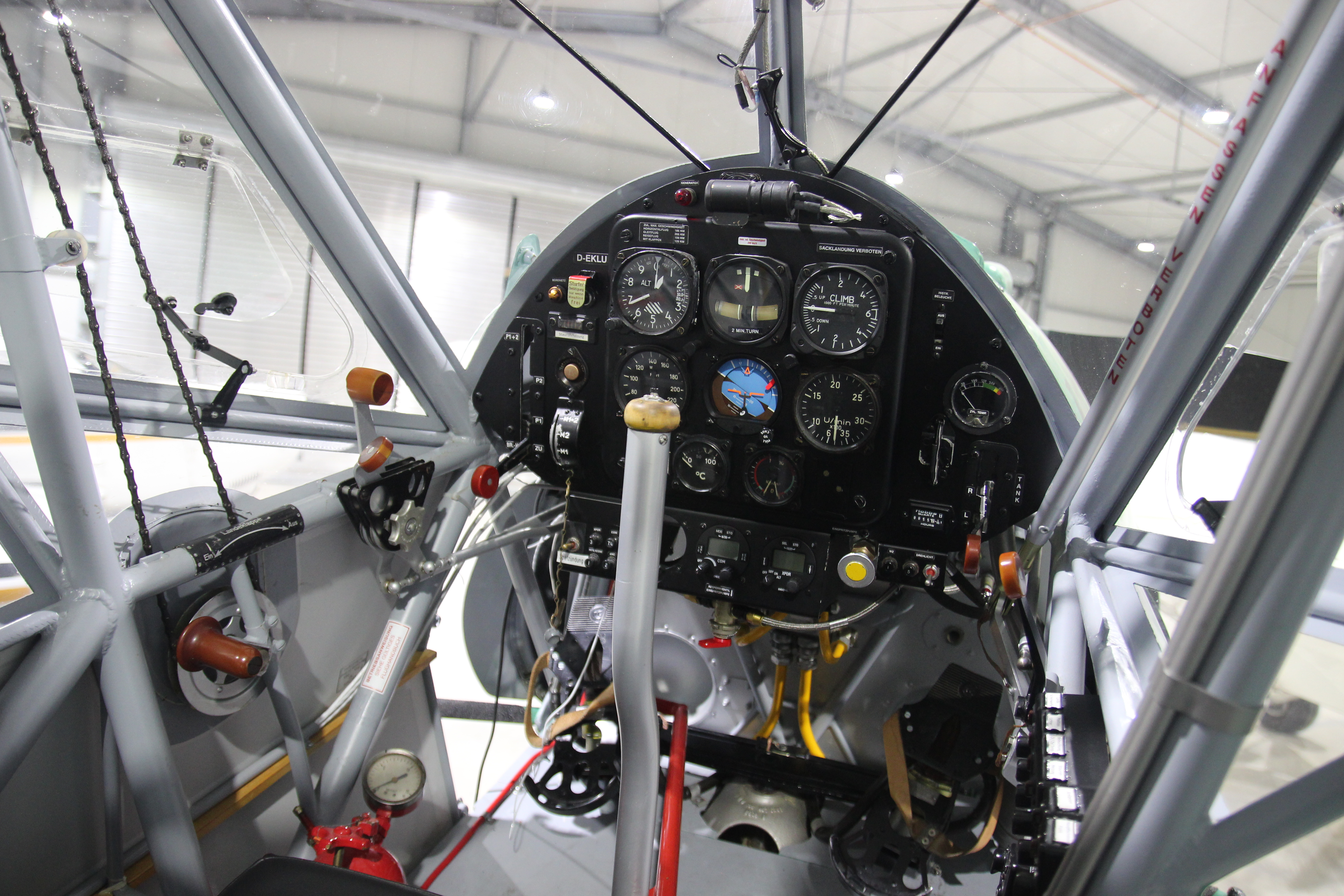 Das Cockpit des Fieseler Storchs D-EKLU